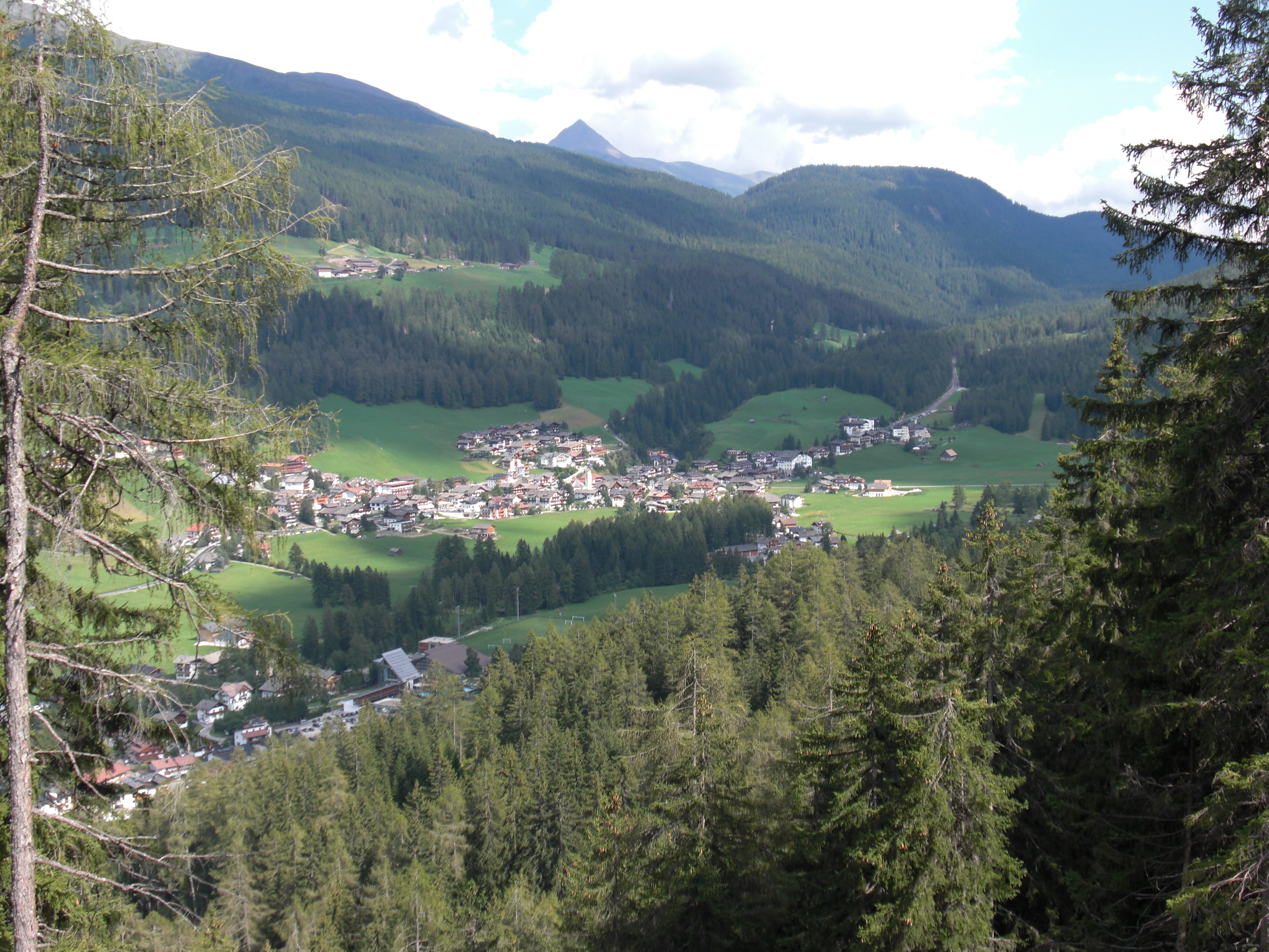 Fraktion Moos der Gemeinde Sexten in Südtirol, Italien.